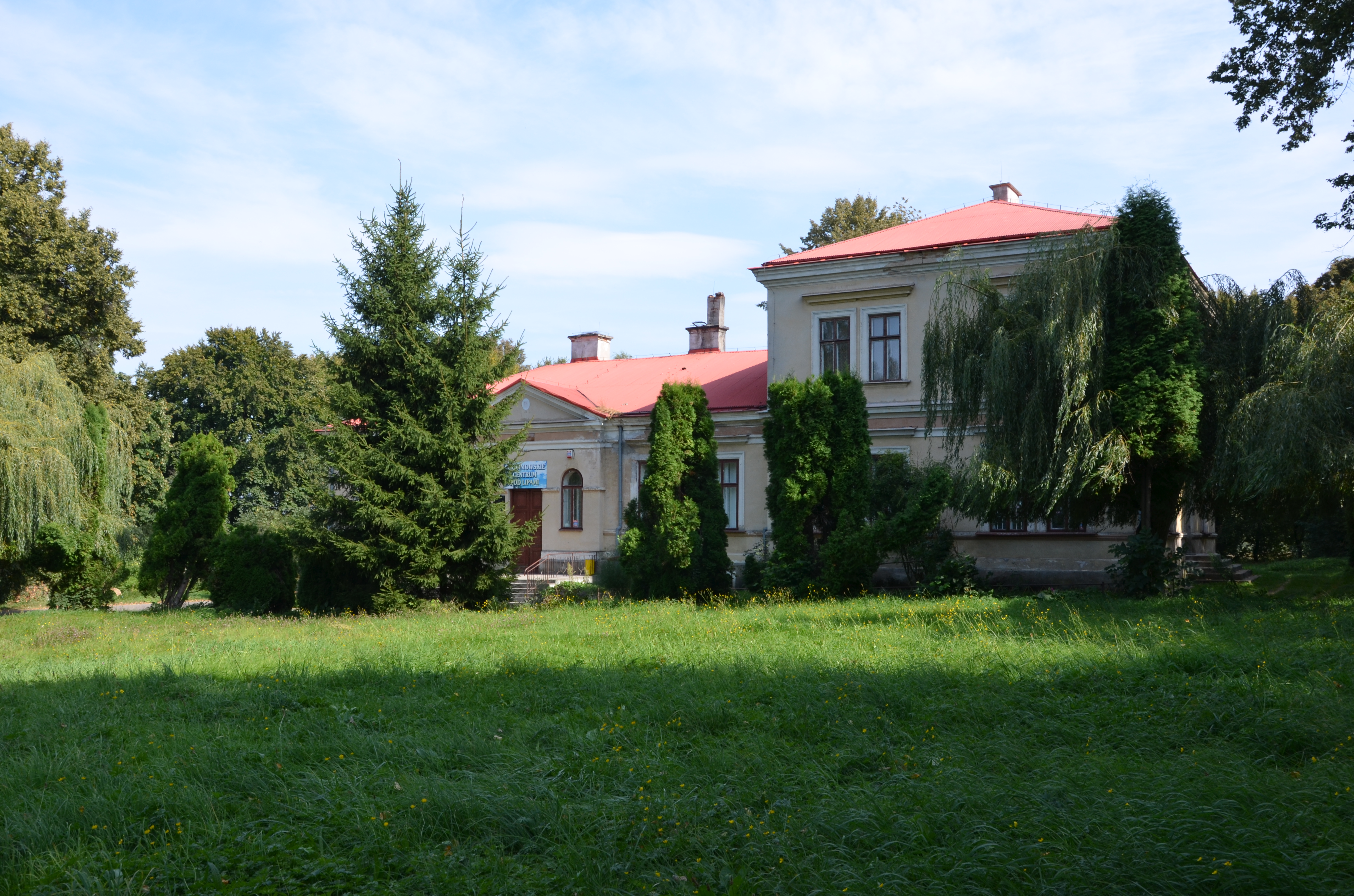 Chocimów, park dworski, 1 poł. XIX w.